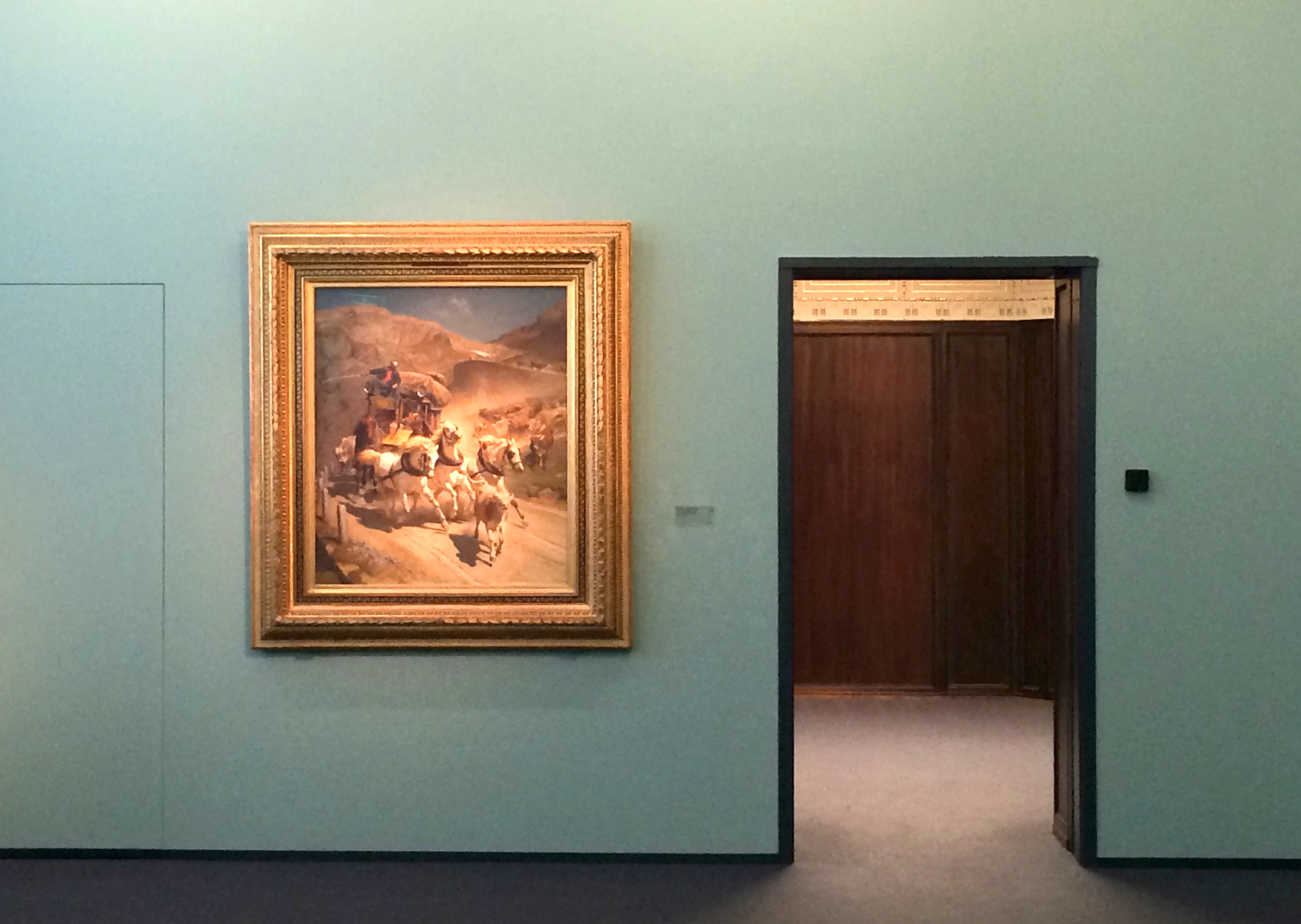 Rudolf Kollers „Gotthardpost“ im Kunsthaus Zürich